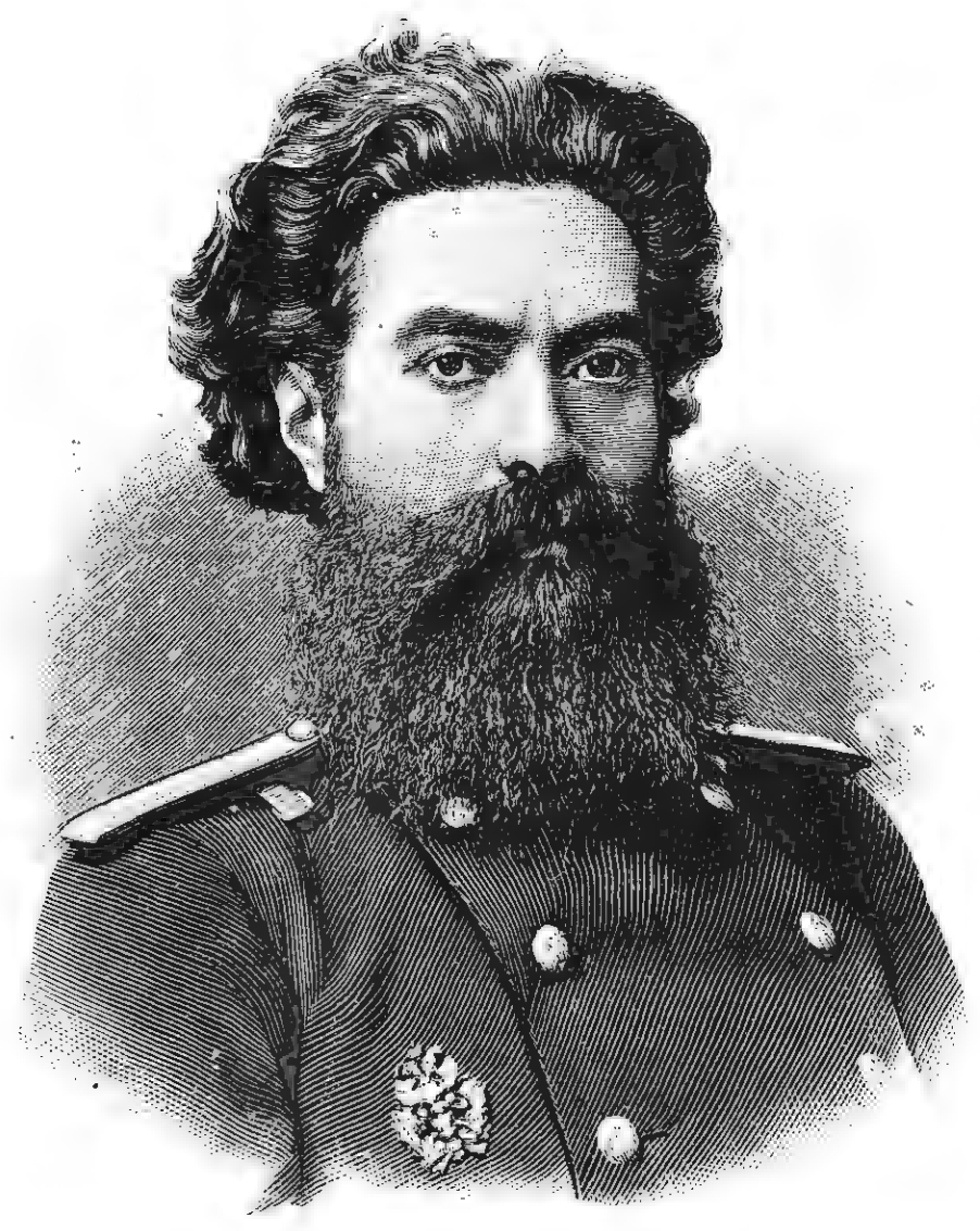 Тарханов, Иван Романович